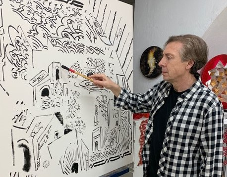 Fotografía del artista andaluz José Manuel Darro pintando en su estudio el lienzo “Puerta de la Justicia de la Alhambra”.